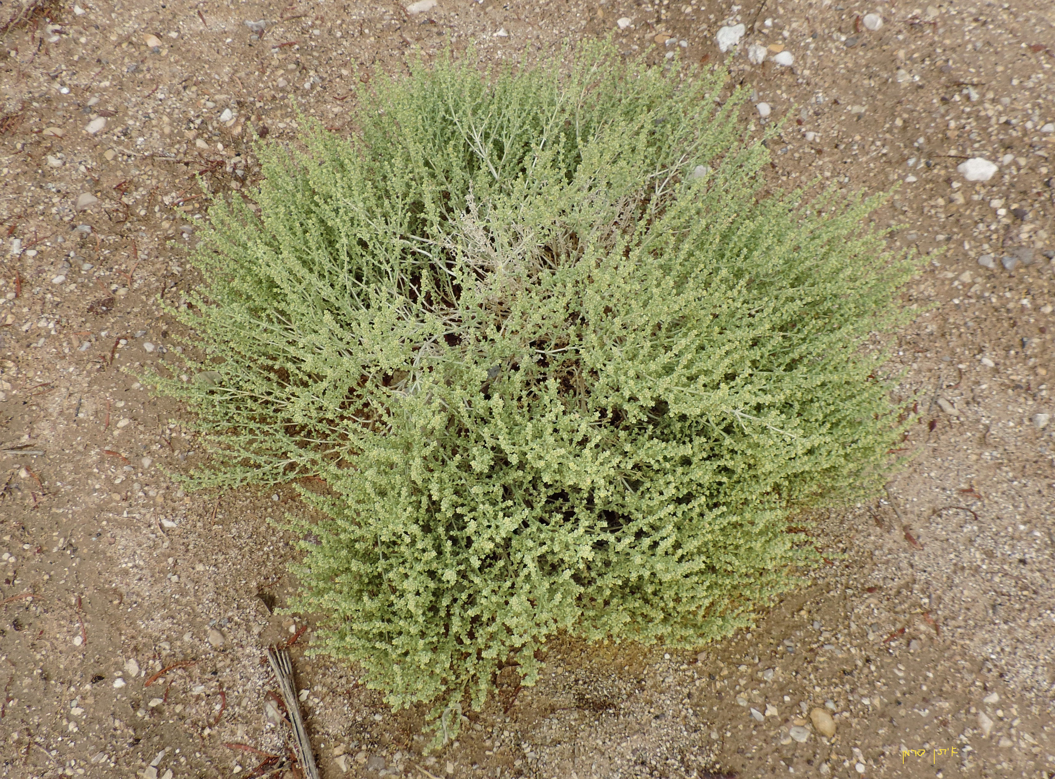 Anabasis setifera - Arava יפרוק זיפני - ערבה, הק"מ ה 101